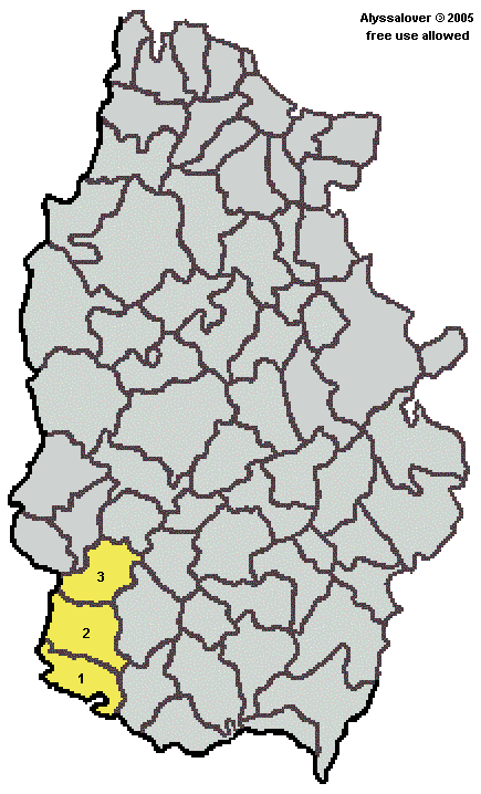 Mapa cos Concellos da Comarca de Chantada.